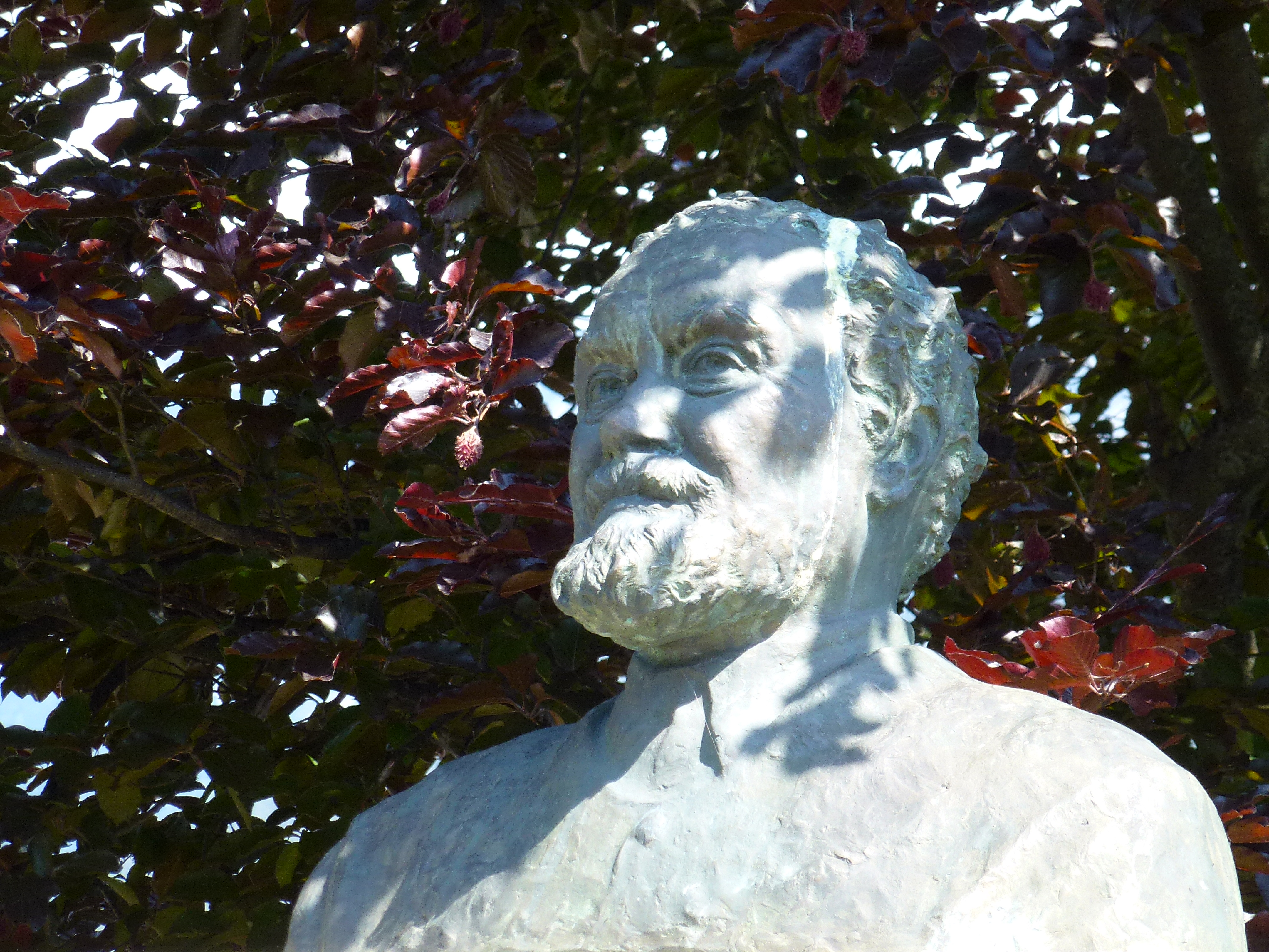 Persönlichkeitsdenkmal Andreas Einberger - gegenüber Prof. Andreas Einberger-Straße 10, Telfs